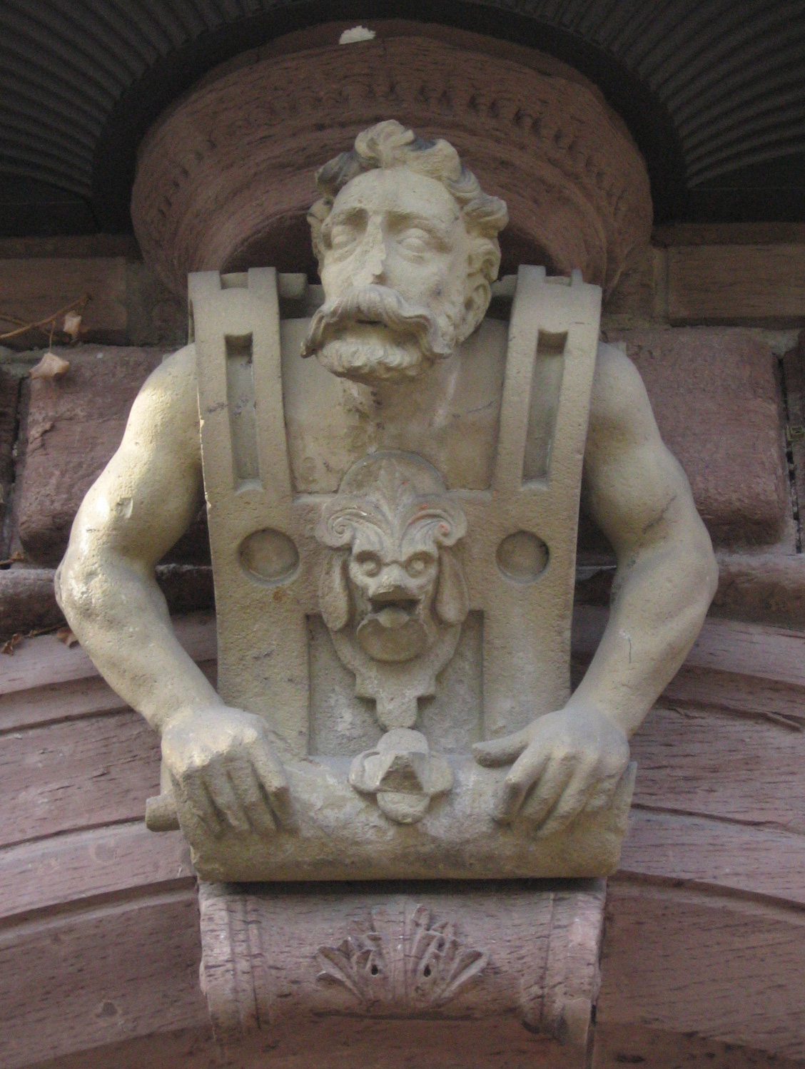 Lastträgerkonsole von Sem Schlör, um 1590, Fragment des Lusthauses in Stuttgart, Baden-Württemberg. Architekt Georg Beer. Heutiger Standort: Villa Berg, Stuttgart